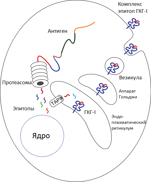 Схема презентации антигена по пути ГКГ-I